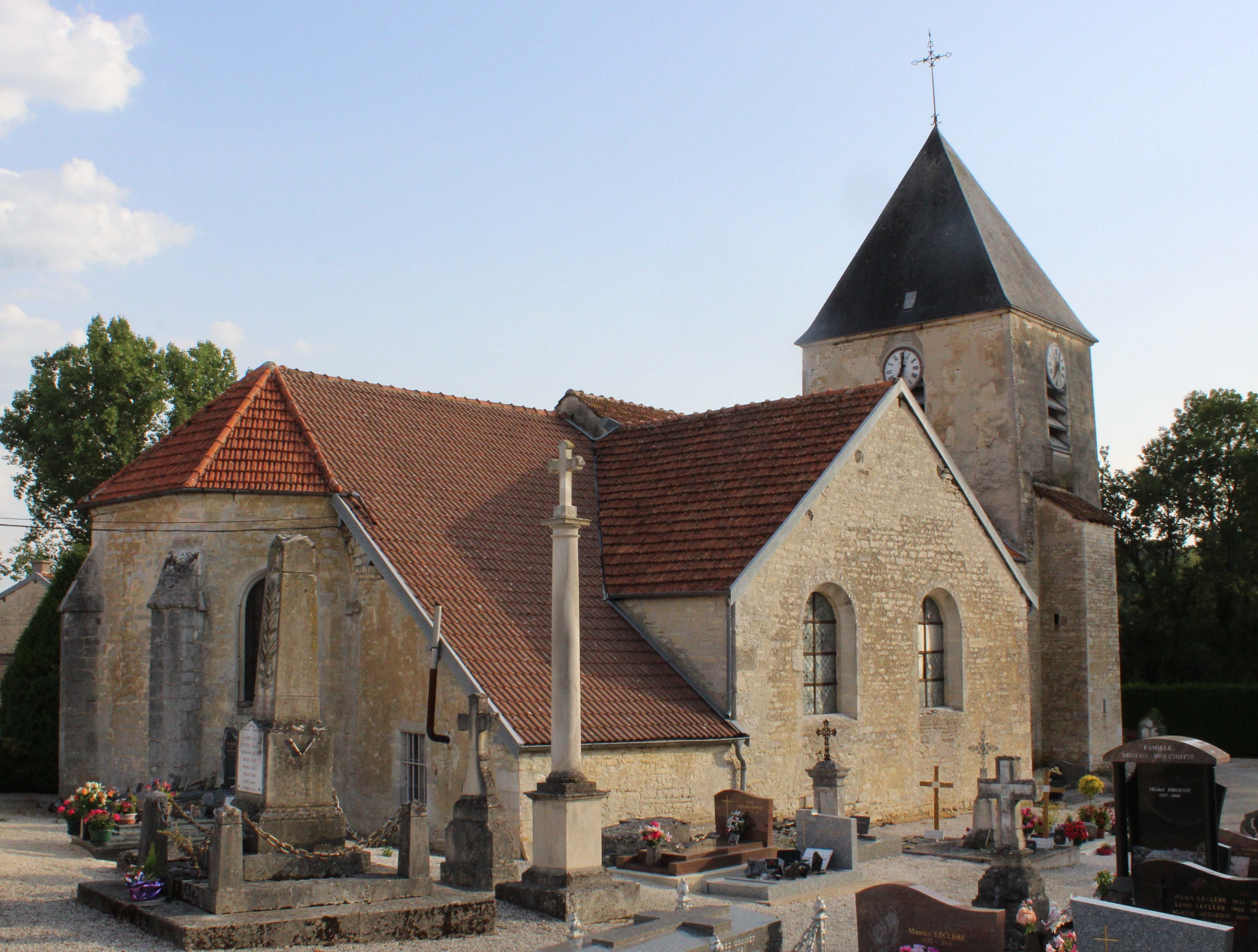 L'église de Saint-Martin-sur-la-Renne